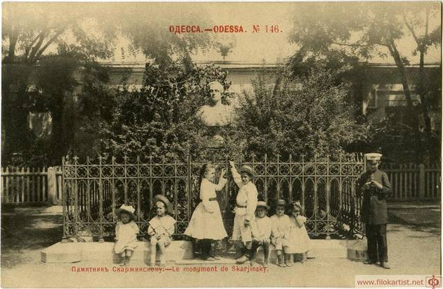 Skarjinski_monument_odesa.jpg: Пам'ятник Петру Скаржинському в Одесі